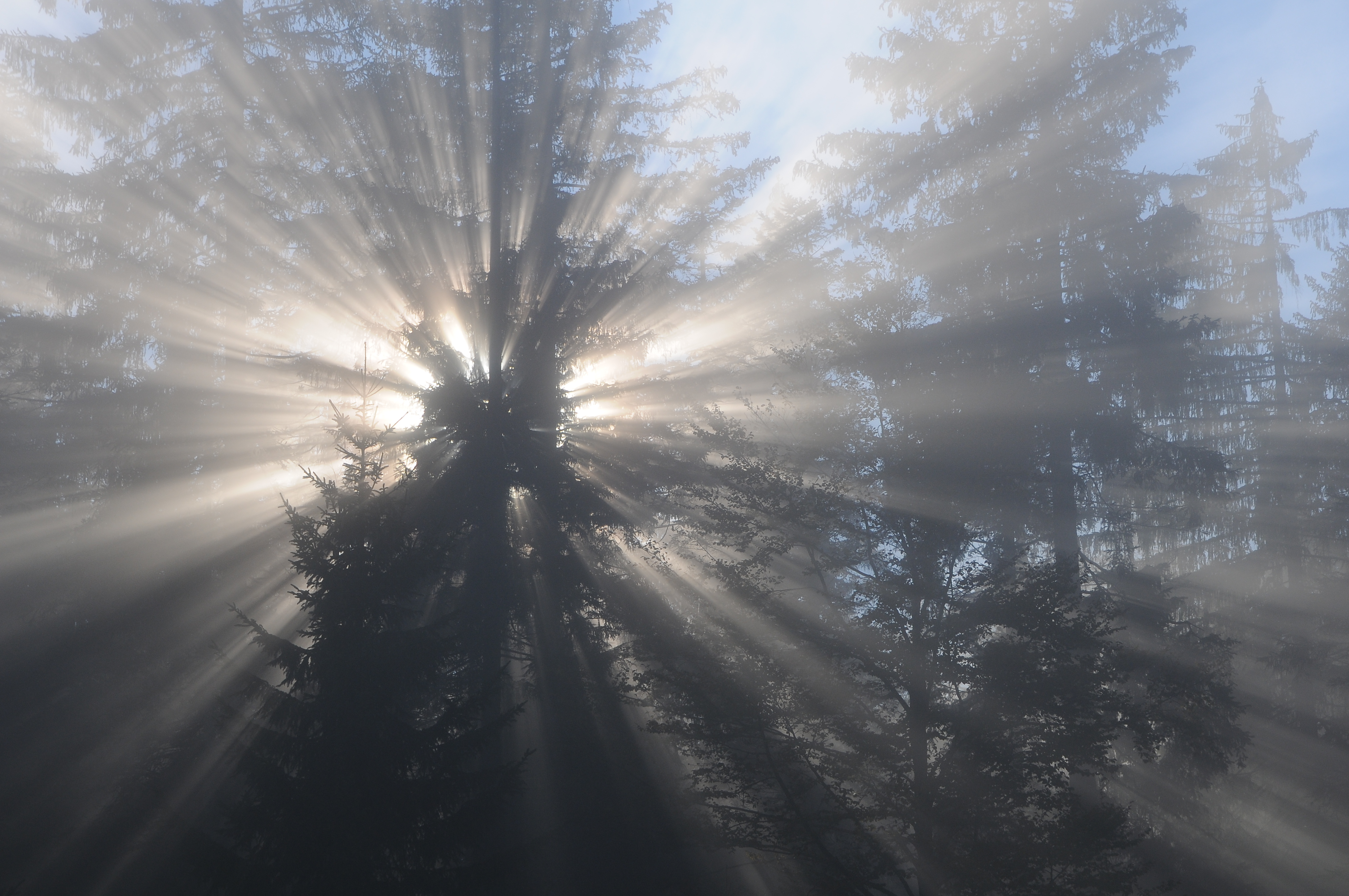 Strahlenbüschel oder Lichtbüschel sind ein Phänomen der atmosphärischen Optik, das durch die Verdeckung der Sonne durch atmosphärische Trübungen hervorgerufen wird.